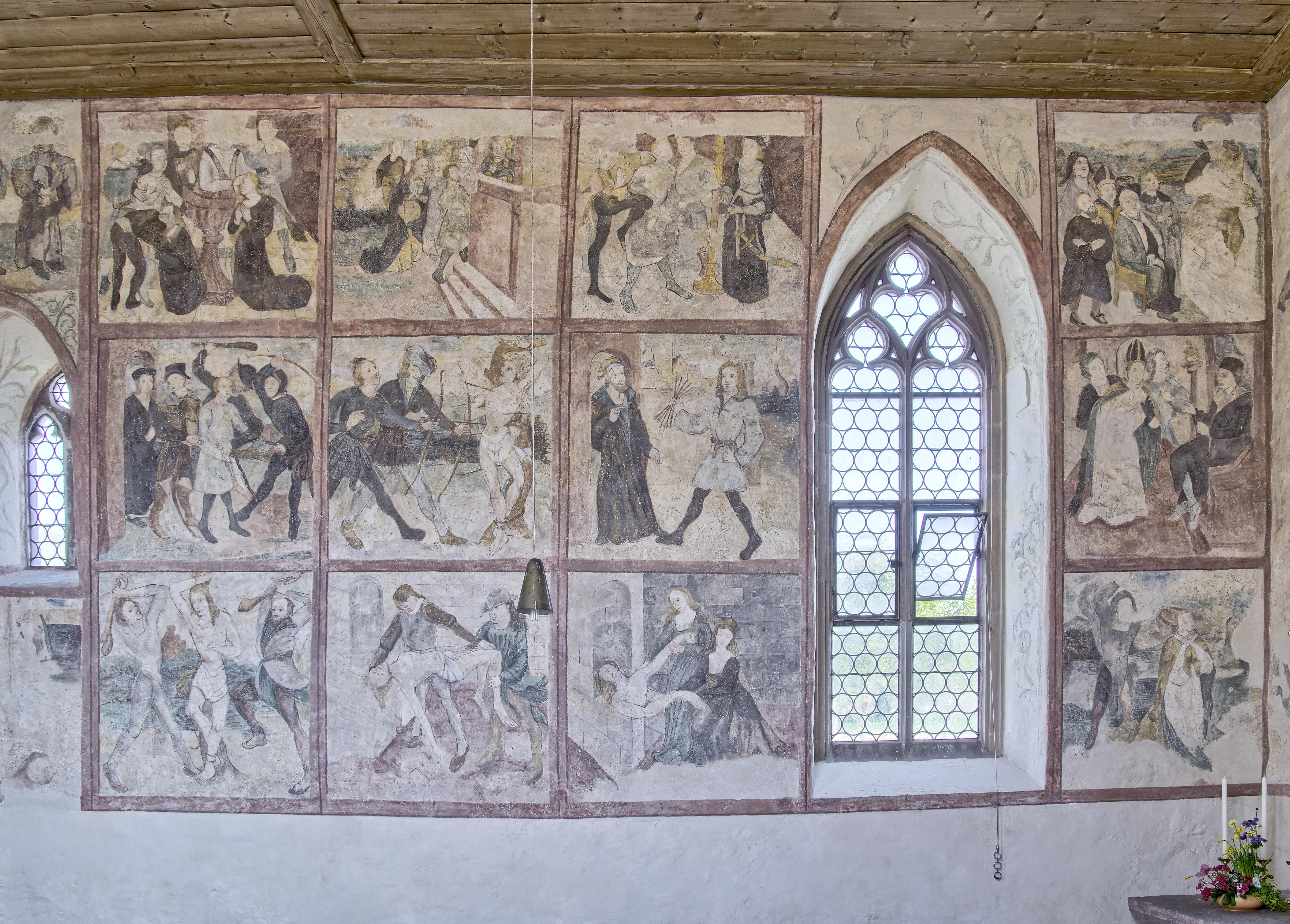 St. Alban in Bötzingen. Sie wurde erbaut um 1480 und war eine ehemalige Kirche des Deutsch-Ordens. Im Volksmund wird sie Peschdkirche genannt. Im Innern sind einige kunstgeschichtliche Kleinode Die katholische Kirche St. Alban in Bötzingen Oberschaffhausen Bilder aus dem Inneren Wandbemalung